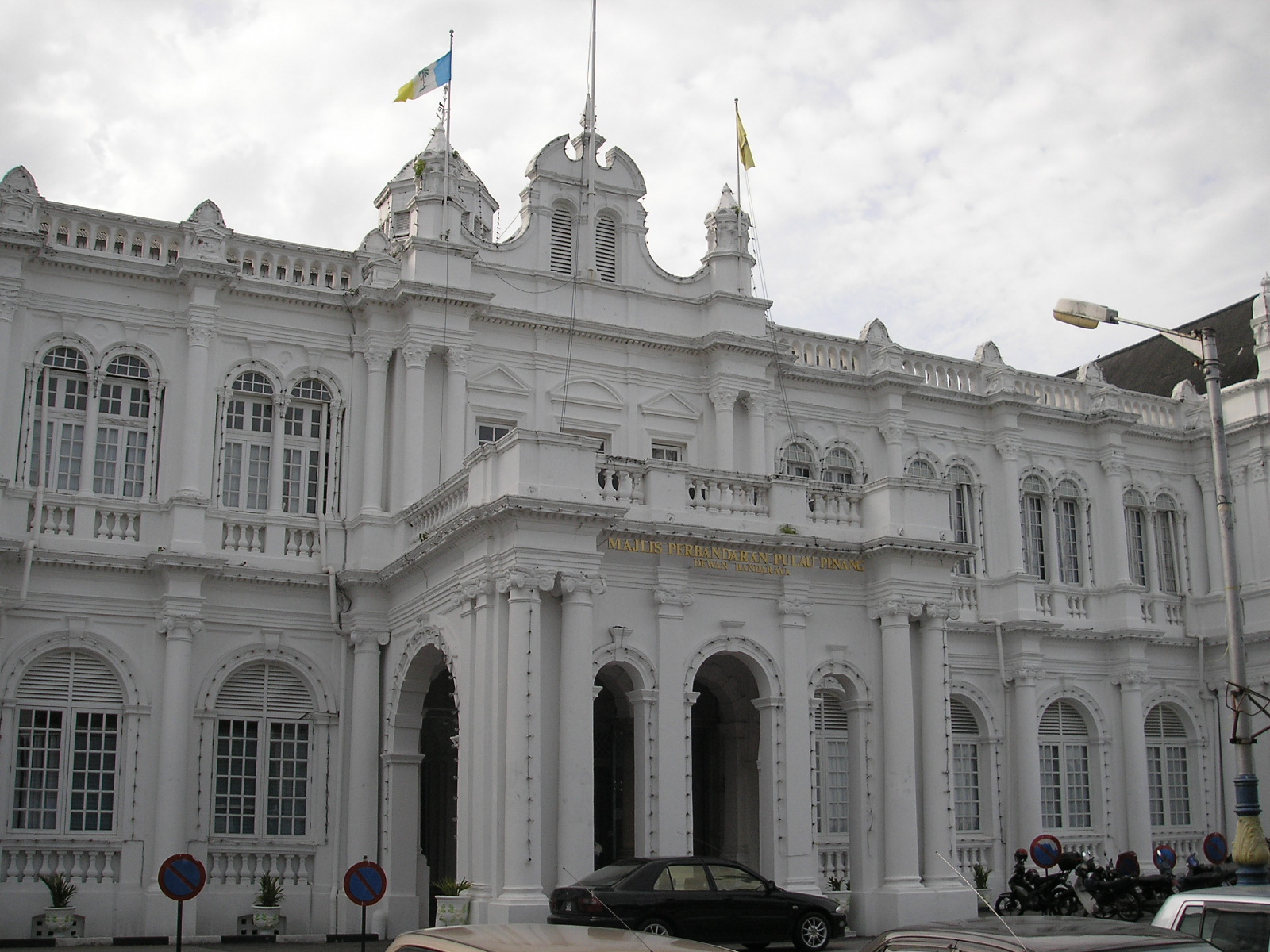 City Hall (Dewan Bandar Raya Pulau Pinang) of Penang.